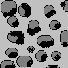 soil structure: Kohaerentgefuege